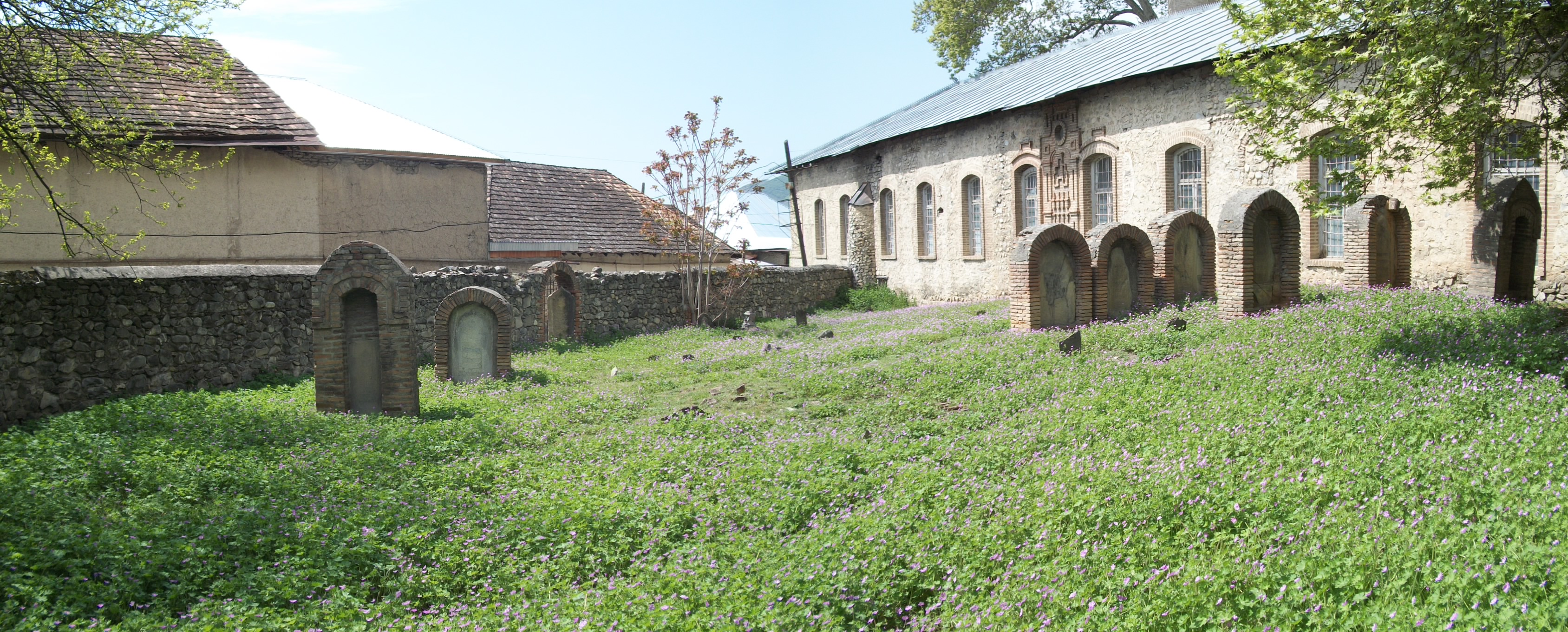 Şəki Xan qəbiristnlığı, ümumi mənzərə